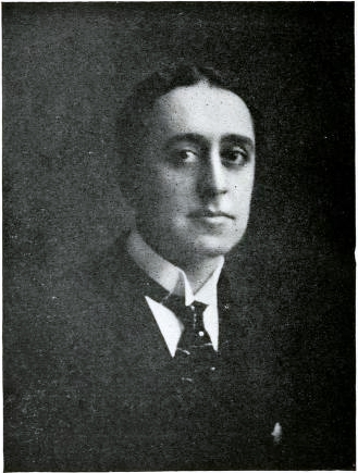 Imagen de César Miranda, escritor uruguayo, nacido en 1884. La foto acompaña una biografía en inglés